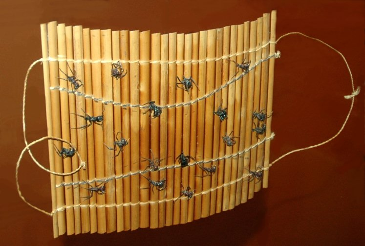 photo d'un plastron de fourmis Paraponera